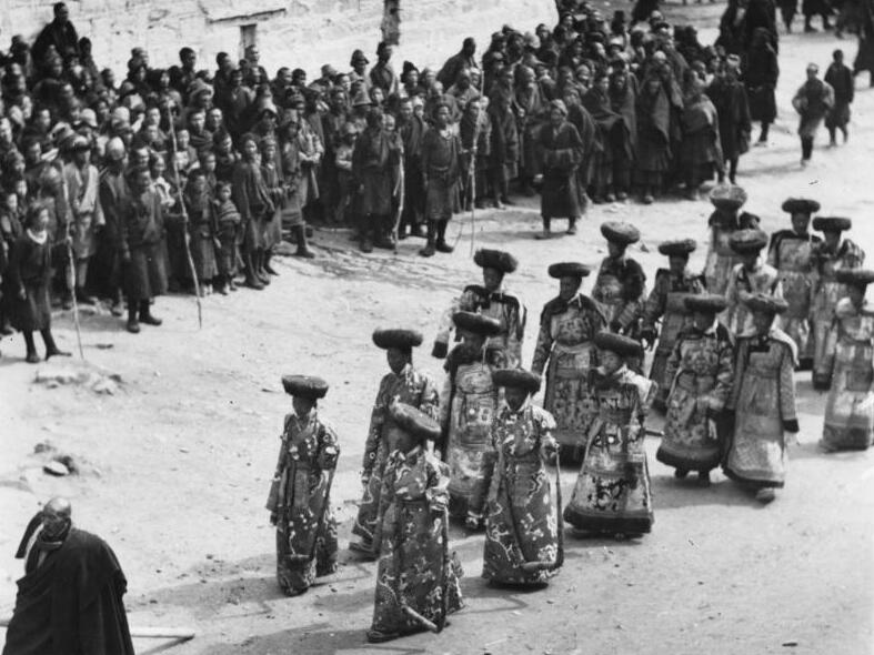 Lhasa, Festhandlungen: Tänze, Paraden, Zuschauer anlässlich des letzten Tages des Neujahrsfestes (Orakel)